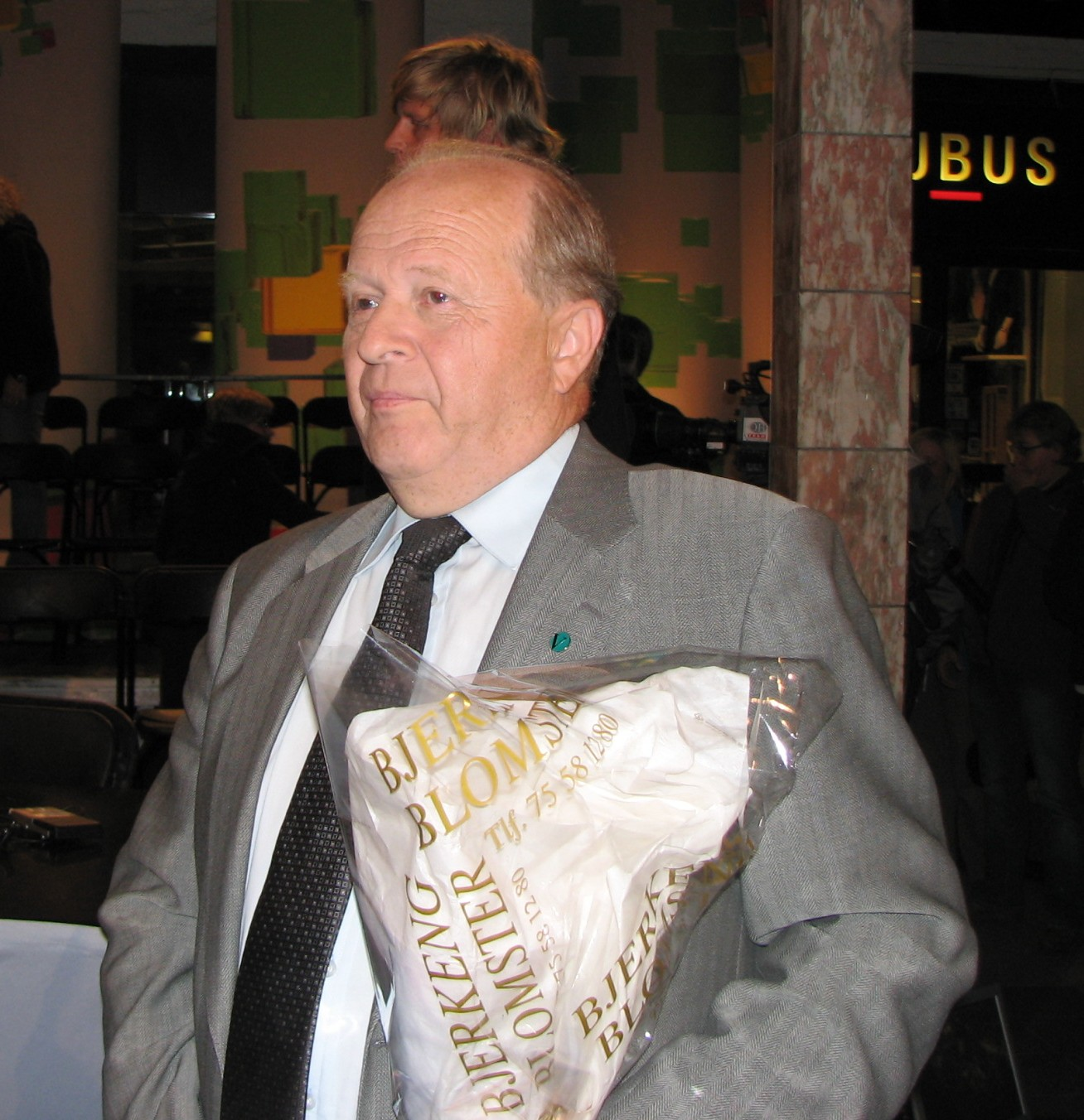 Odd Einar Dørum, mangeårig stortingsrepresentant for Venstre og justisminister i Bondevik I og Bondevik II regjeringene